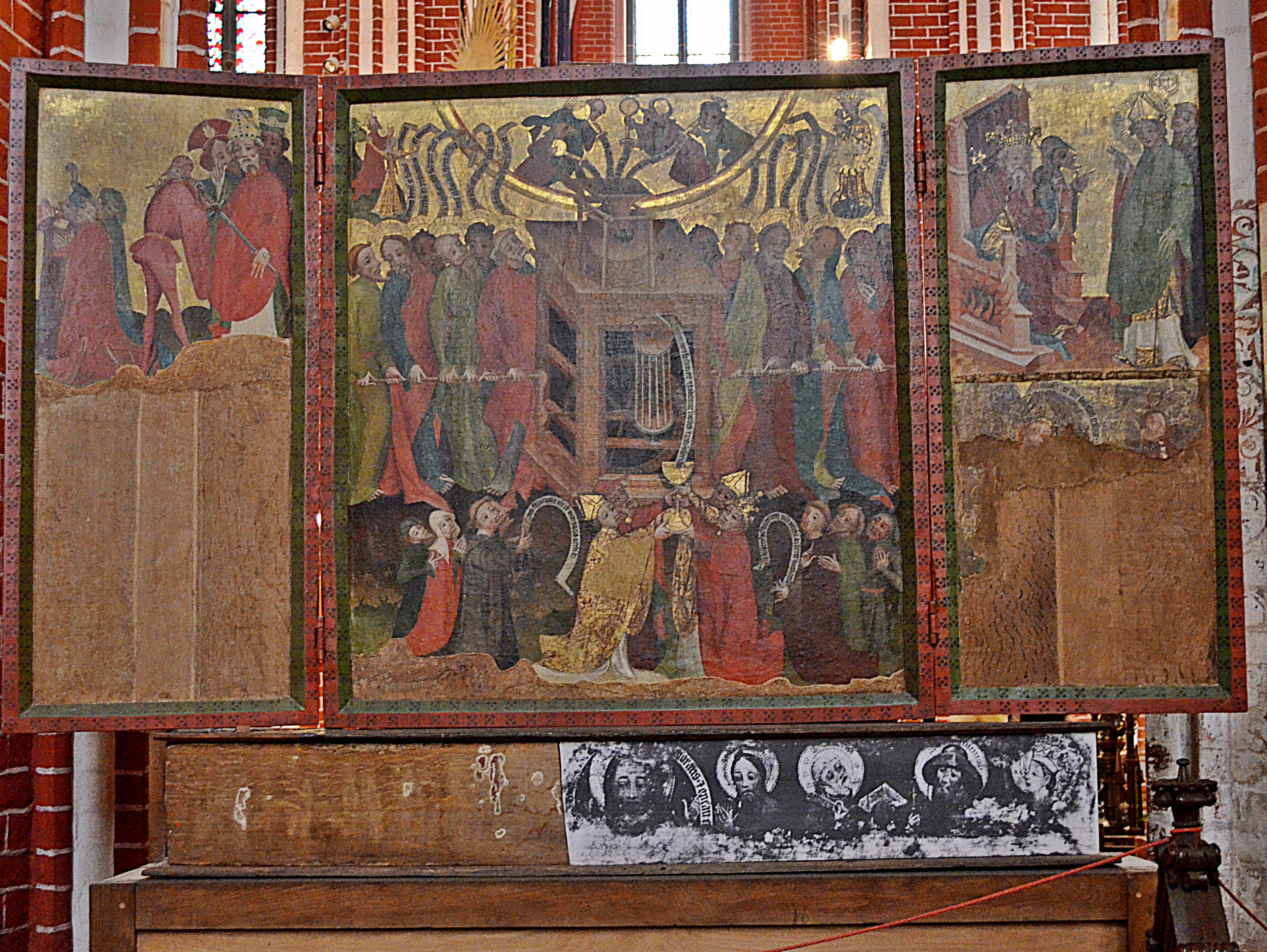 Bad Doberan, Münster, Mühlenretabel, um 1410-1420. S